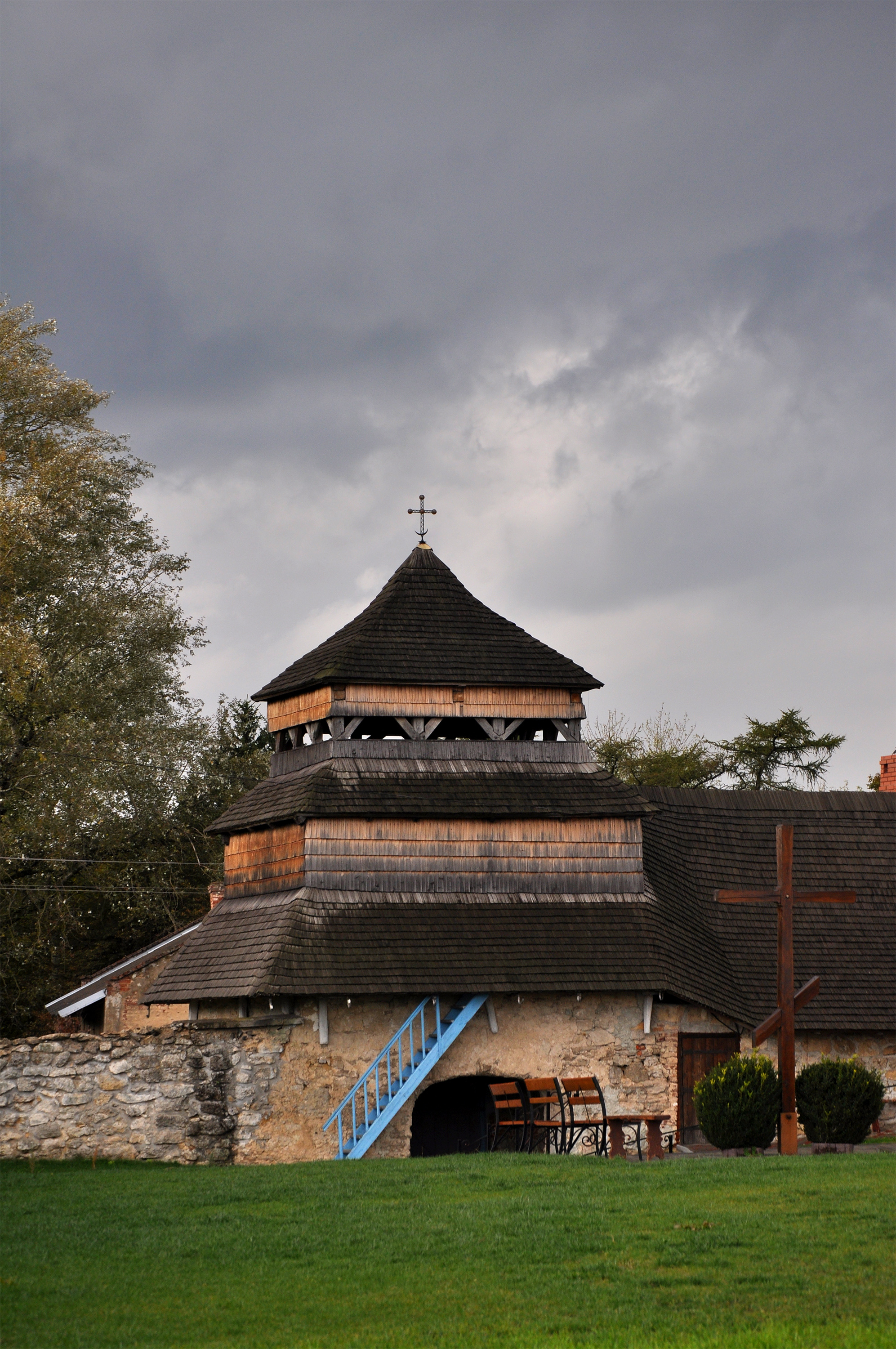 Надбрамна дзвіниця з мурами (мур.), с.Піски